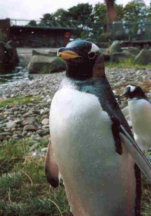 Eselspinguin, fotografiert von M. Zibelius, Zoo Edinburgh, GNU FDL erteilt